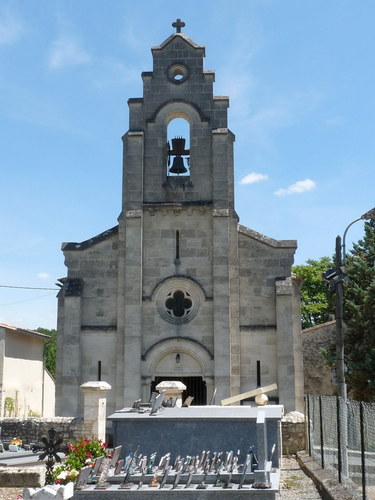 Eglise de Ligueux, Gironde, France